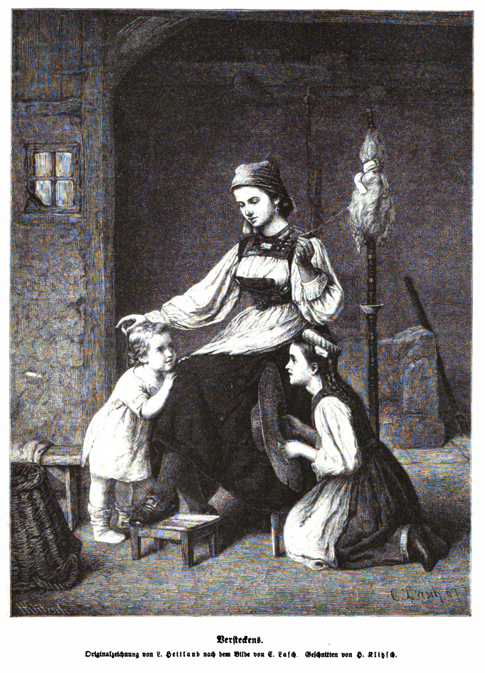 Versteckens. Originalzeichnung von L. Heitland nach dem Bilde von C. Lasch. Geschnitten von H. Klitzsch